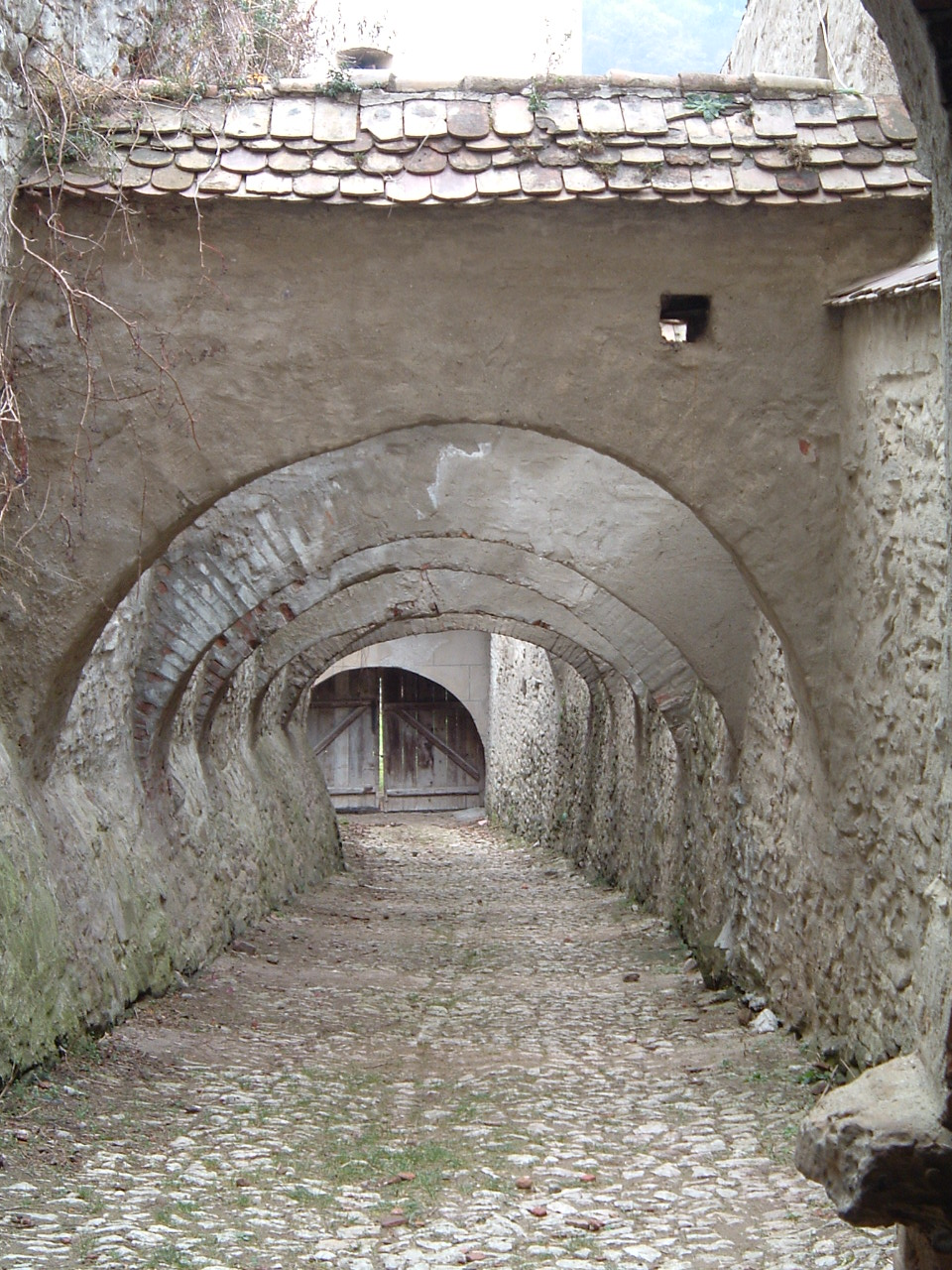 Berethalom, Erődtemplom